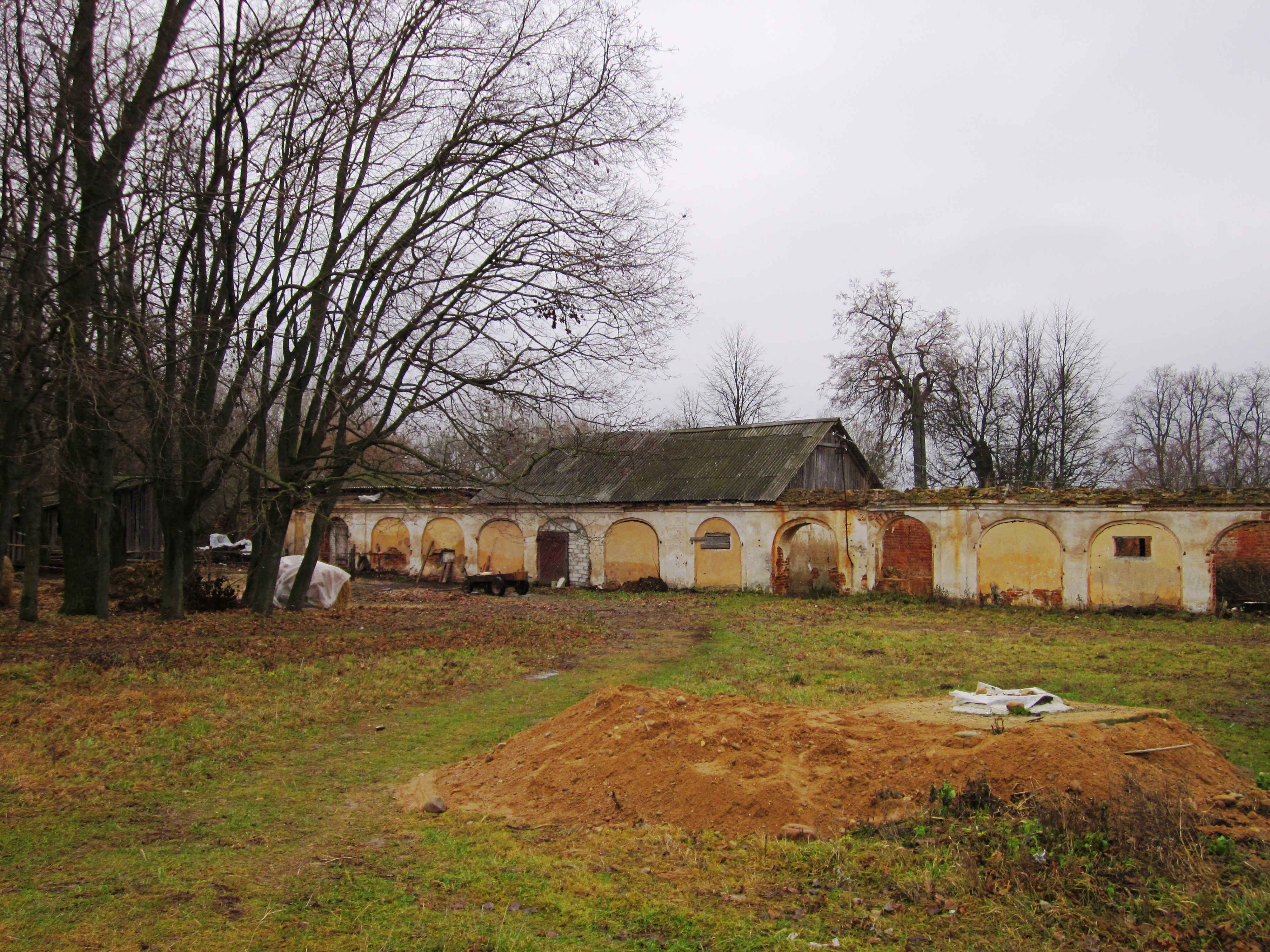 Беларуская (тарашкевіца): Фрагмэнты ансамбля былога палаца Храптовічаў:флігельвяндлярняпаркбібліятэка. в. Шчорсы This is a photo of Belarusian heritage monument. Reference number: 412Г000467 ( WLM)